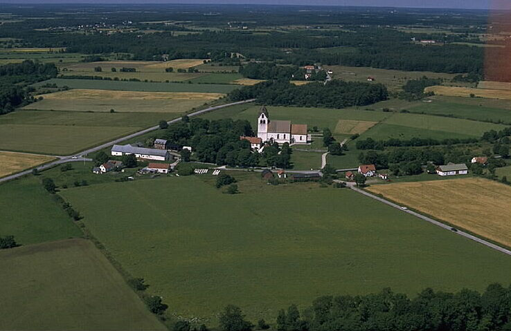 Grötlingbo kyrka i bildens mitt. Motiv: Grötlingbo Nyckelord: Flygbilder, Riksintressen Kategori: Kyrkomiljö Grötlingbo kyrka i bildens mitt. Länsväg 142 går förbi väster om kyrkan.